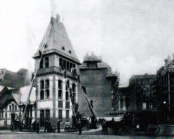 Übungsturm der Feuerwache Burgstraße